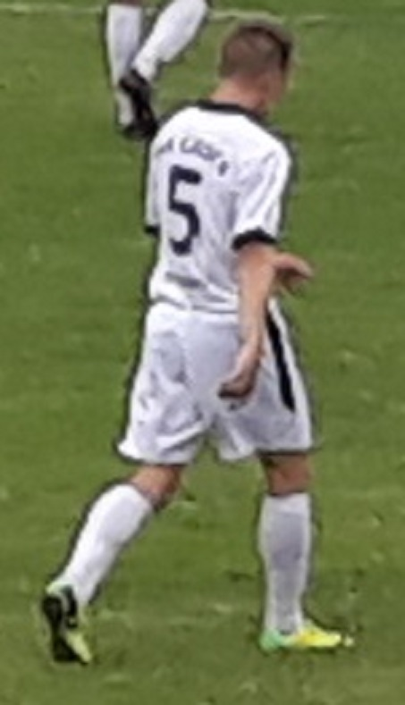 Лазар Зола Вулић у дресу Слоге из Краљева